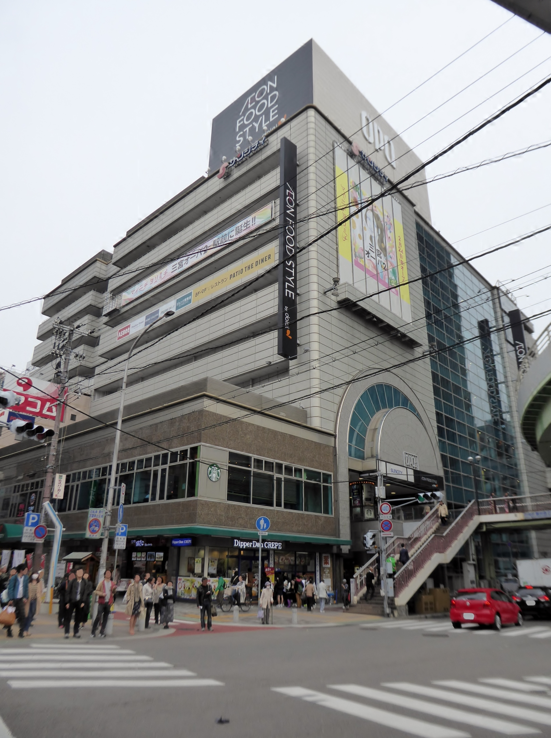 ダイエー神戸三宮店を撮影。